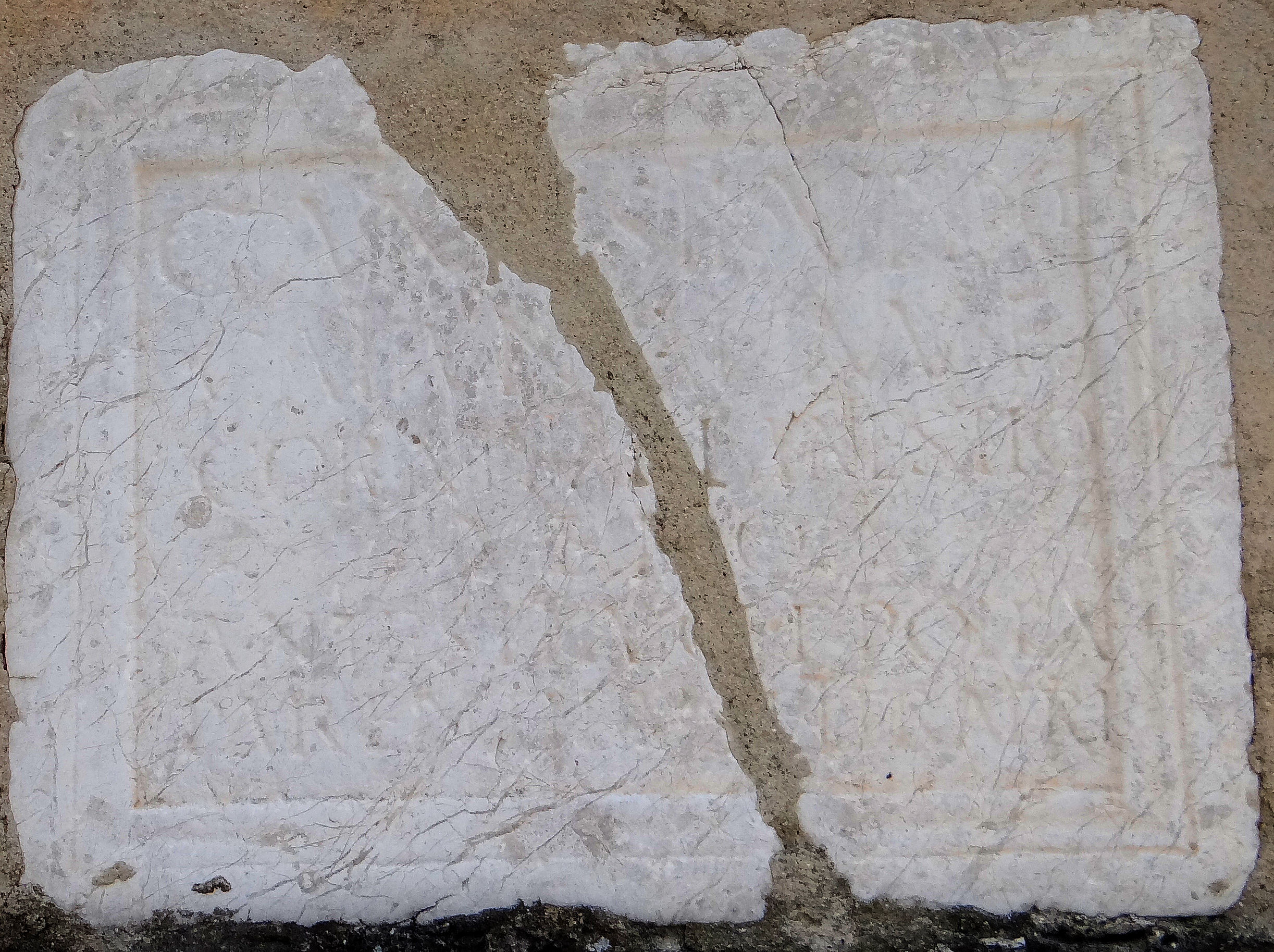 Châteauneuf-Villevieille - Église Notre-Dame-de-l'Assomption de Villevieille - Inscription romaine encastrée ans la façade de l'église